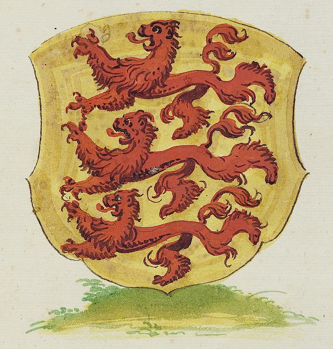 Wappen aus: David Wolleber: Chorographia Württemberg, [Schorndorf] 1591, Universitätsbibliothek Tübingen, Mh 6,1 Wappen (?) (auf der Titelseite der Geschichte der letzten Herzoge von Schwaben sowie der Herren von Klingenberg)